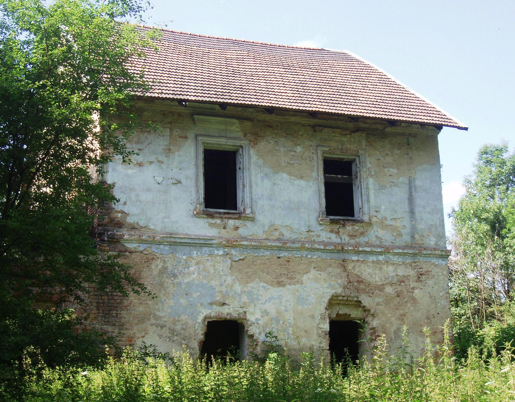 Zespół dworski Młodziejowice